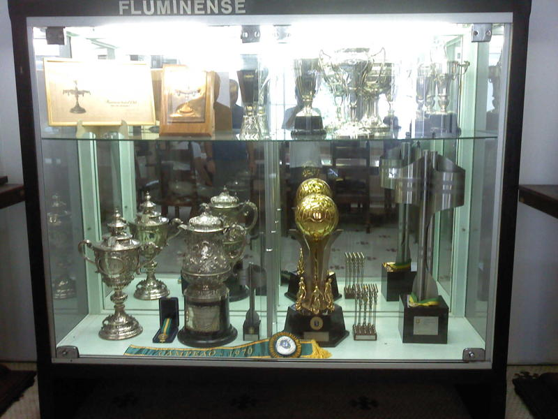 Taças da Copa Rio e dos três títulos brasileiros do Fluminense.